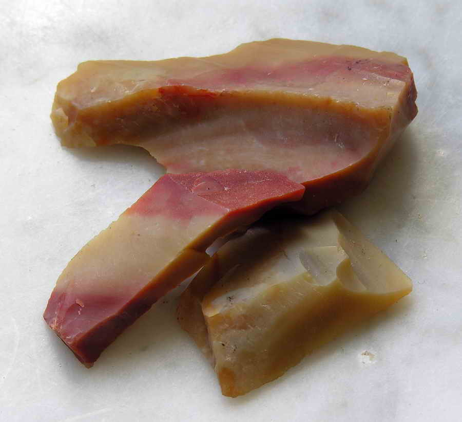 mineral. Nikon E-8800